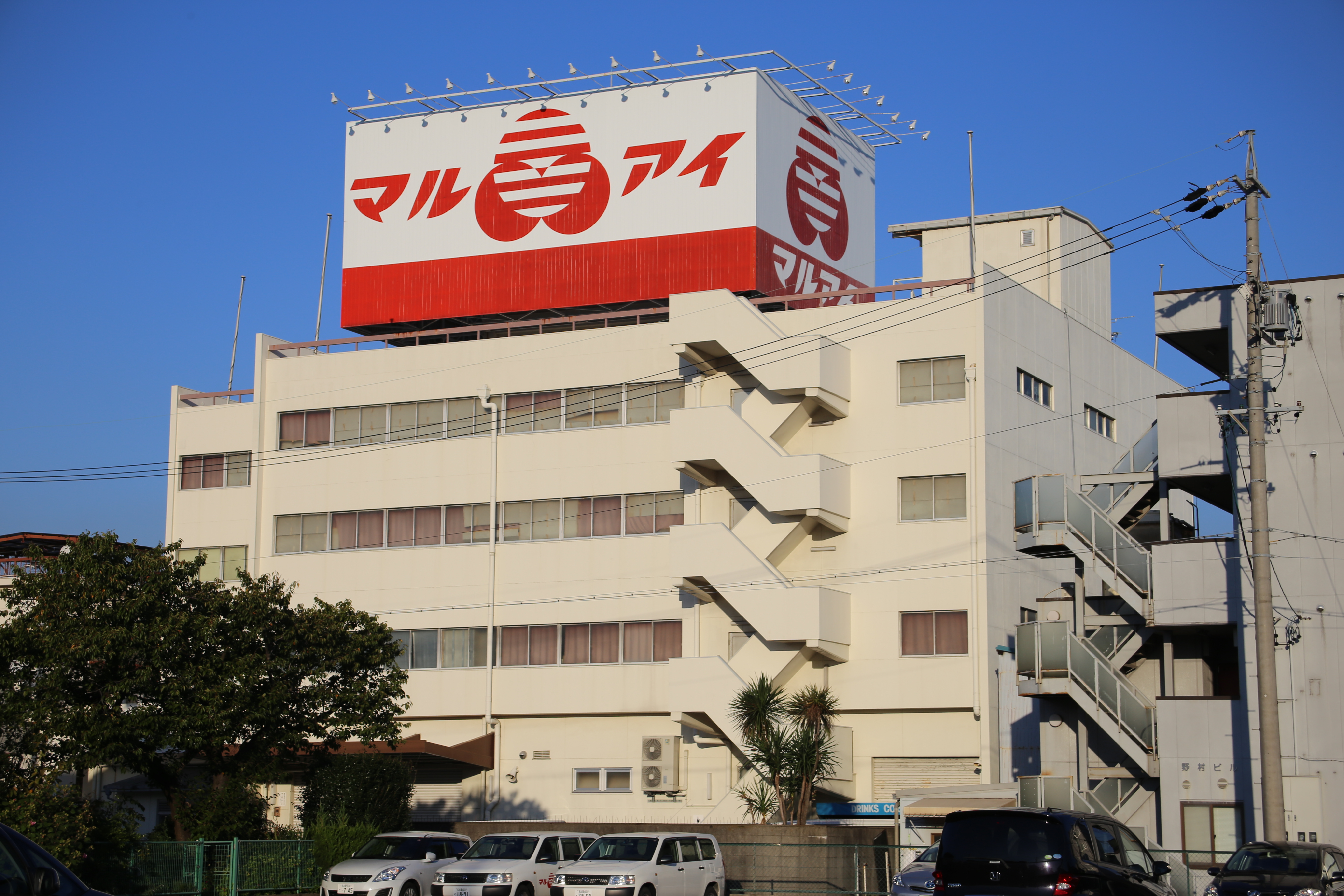 名古屋市熱田区一番二丁目のマルアイ本社を南側公道西側より撮影